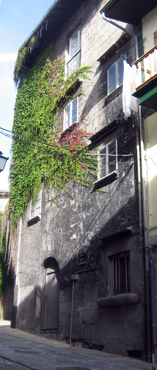 Torre Turpin, del siglo XVI, en la localidad vizcaína de Lekeitio.